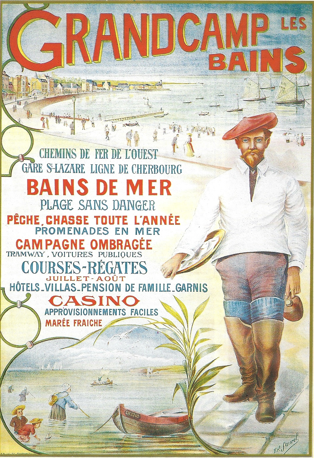 PEINTRE DESSINANT LA COTE GRANDCOPAISE AVEC LES ATTRACTIONS DE L'EPOQUE